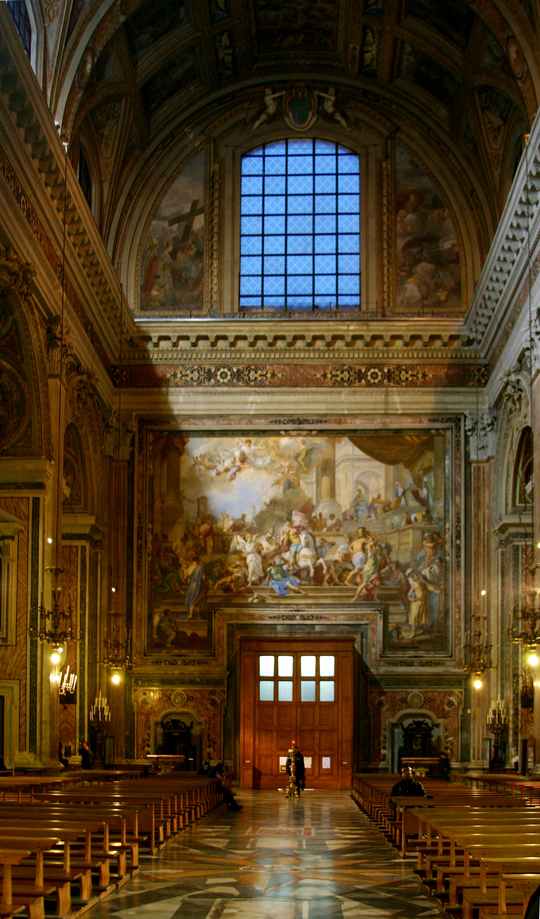 Gesù Nuovo - Naples